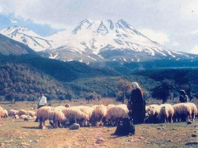 Helvadere de Hayvancılık